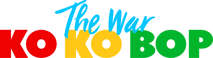 Logo de Ko Ko Bop de EXO